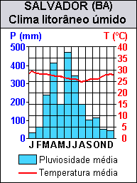 Climate and precipitation in Salvador, Bahia, Brazil.